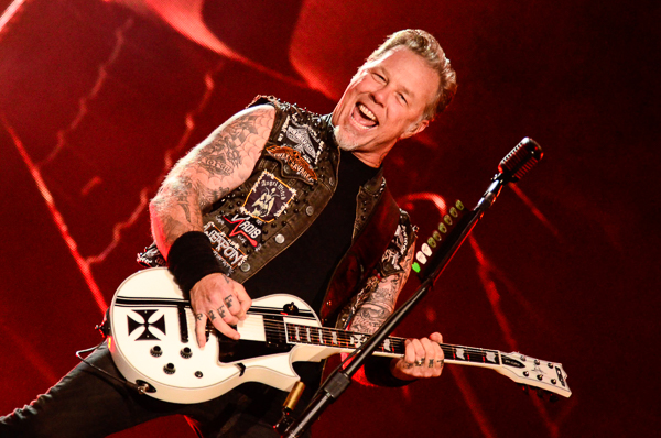 James Hetfield - Rock in Rio 2015